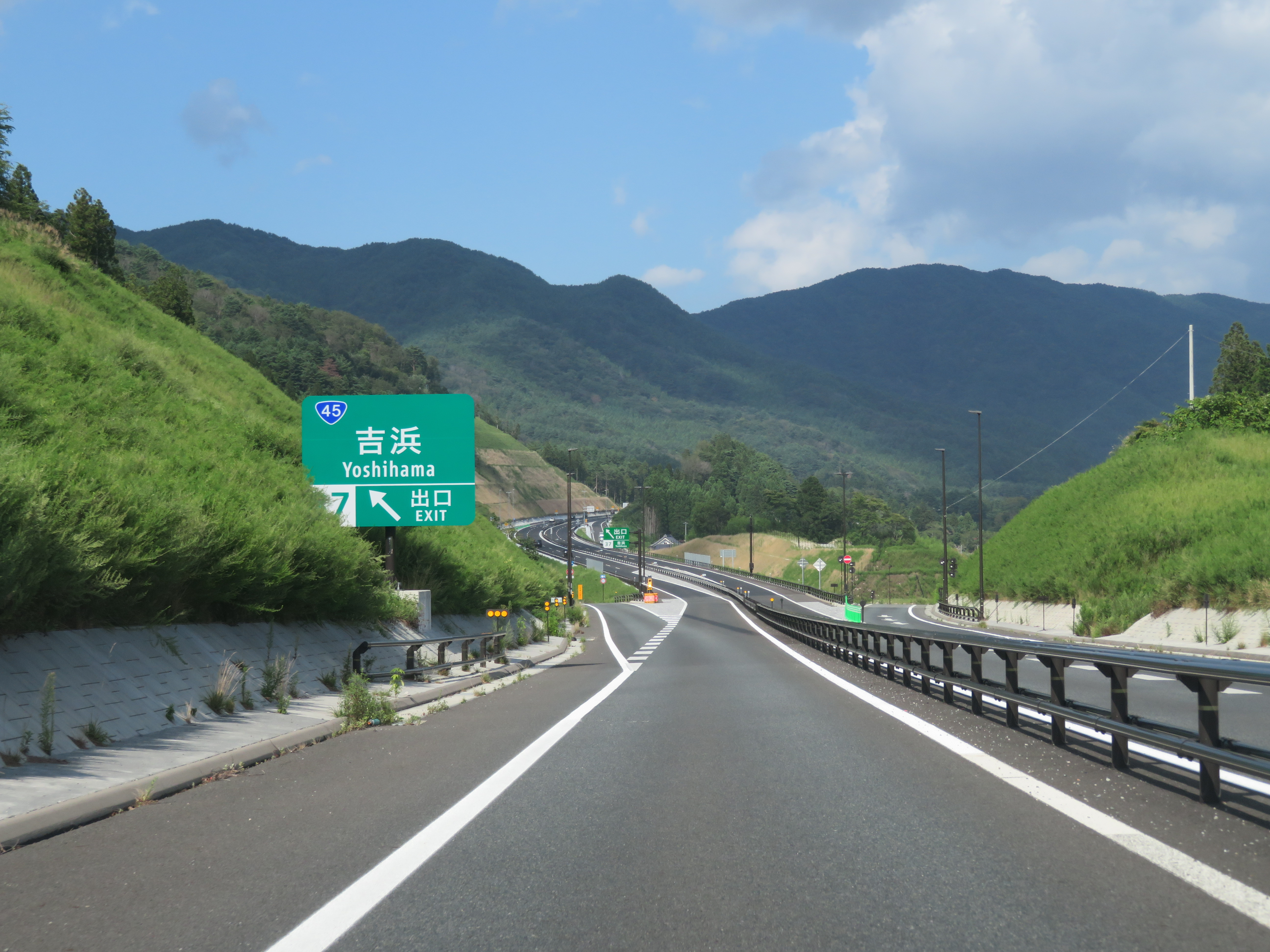 三陸自動車道吉浜インターチェンジ（大船渡方面側出口付近） Canon PowerShot SX720 HS